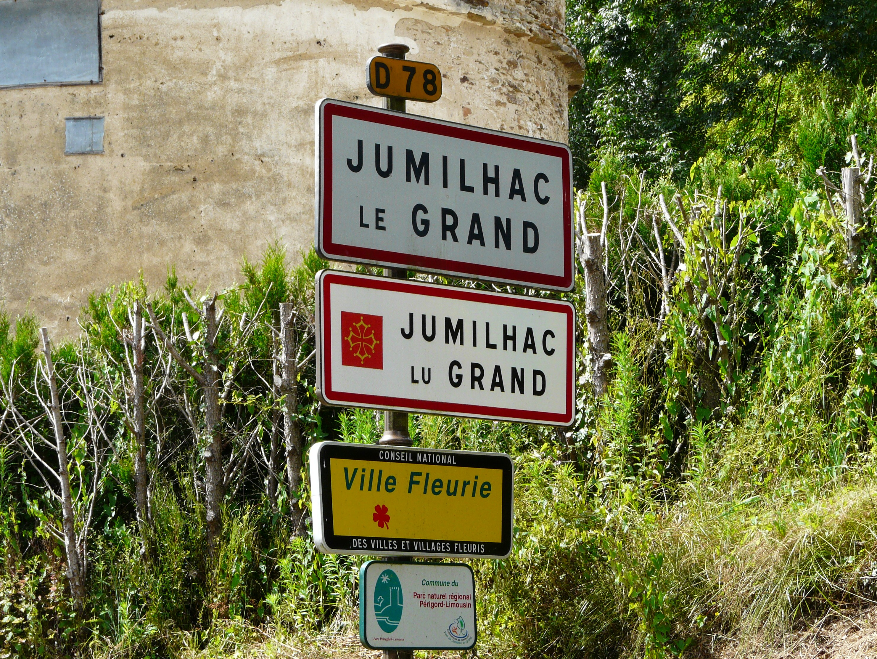 Sur la route départementale 78, panneau bilingue français-occitan d'entrée dans Jumilhac-le-Grand, Dordogne, France.